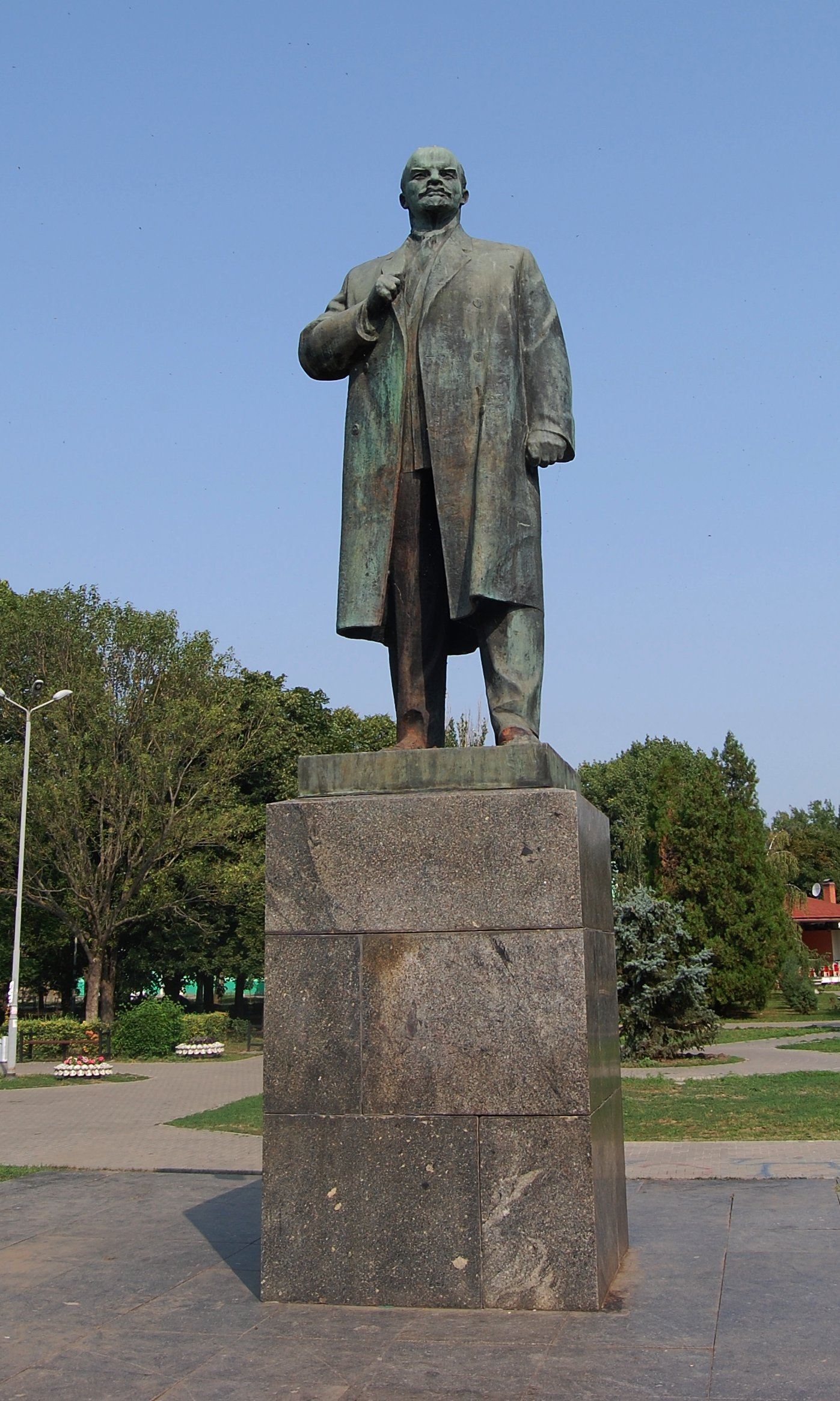 Памятник Ленину (1970, Таганрог). Lenin's monument, Taganrog